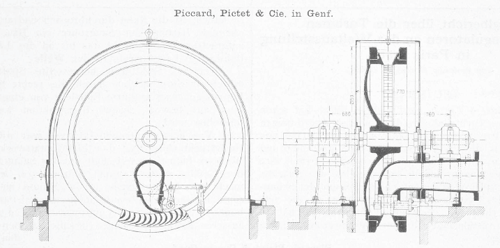 horizontale 1000 PS-Girard-Turbine für das Kraftwerk Pissevache